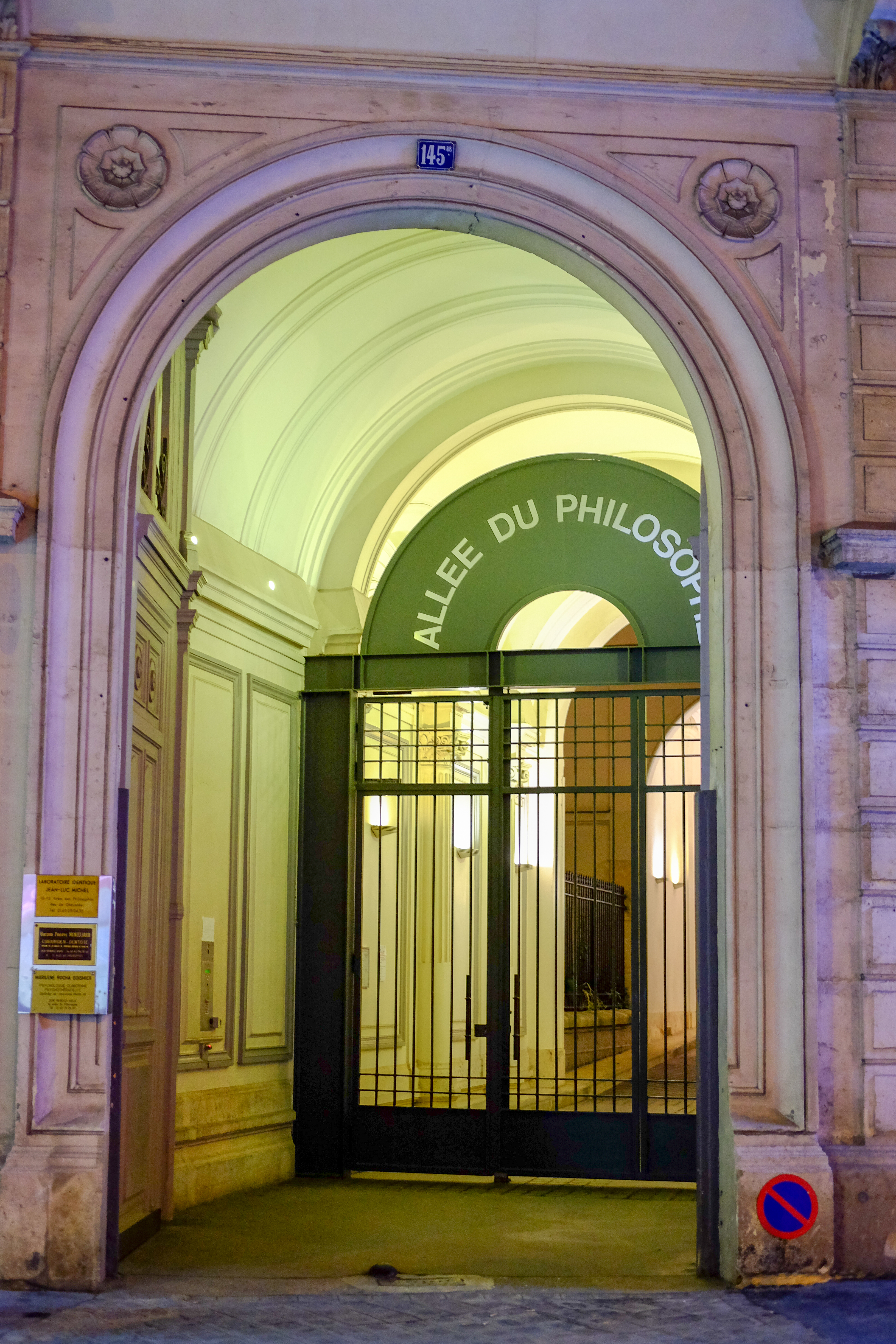 Entrée de l'Allée du philosophe le soir. 145 boulevard Voltaire, Paris 11ème